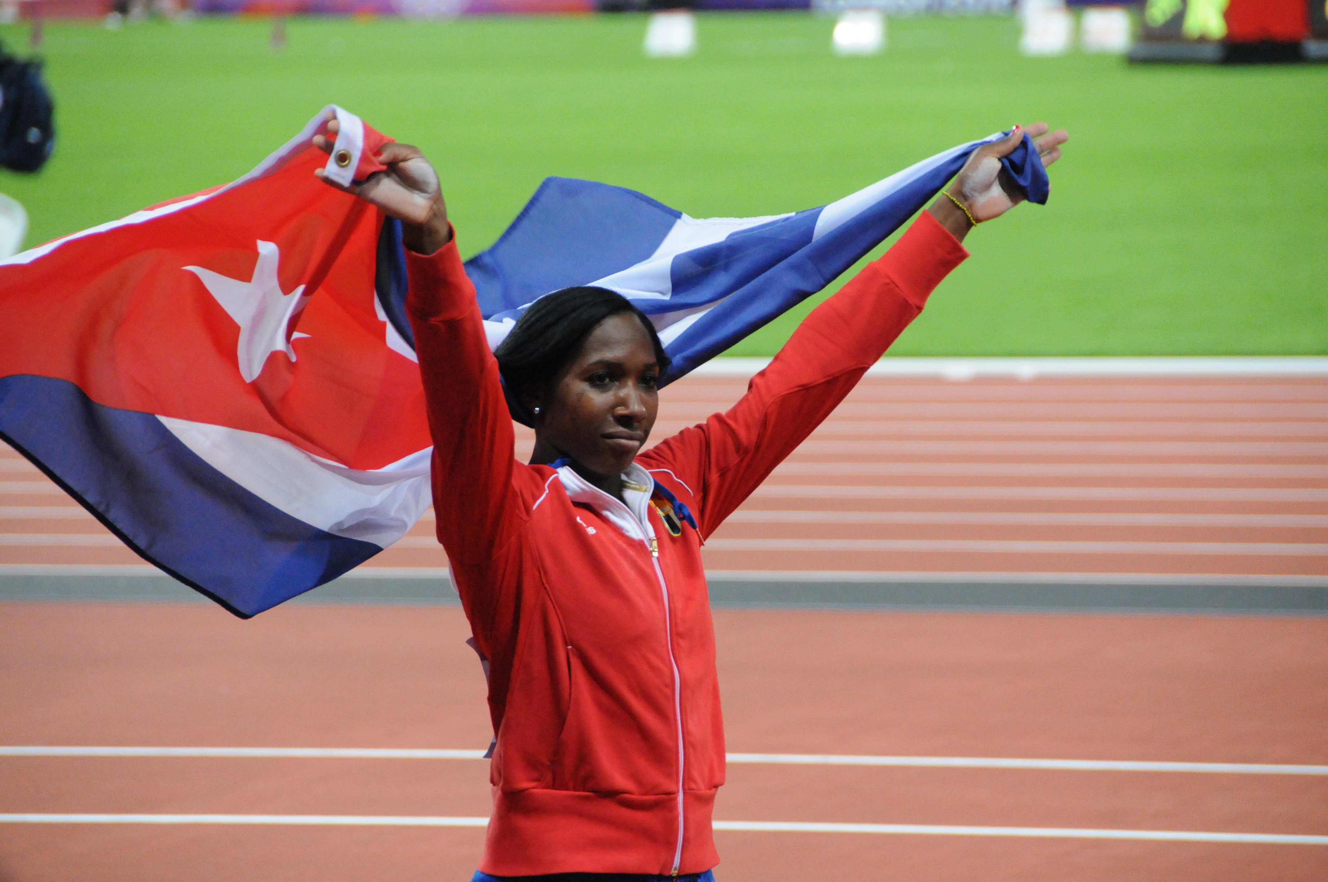 La perchiste Yarisley Silva (CUBA) fêtant sa médaille d'argent aux JO de Londres 2012